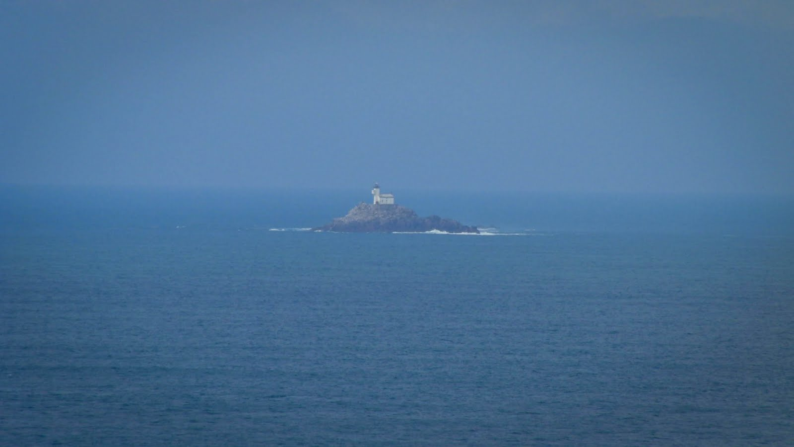 Tevennec vom Cap Sizun